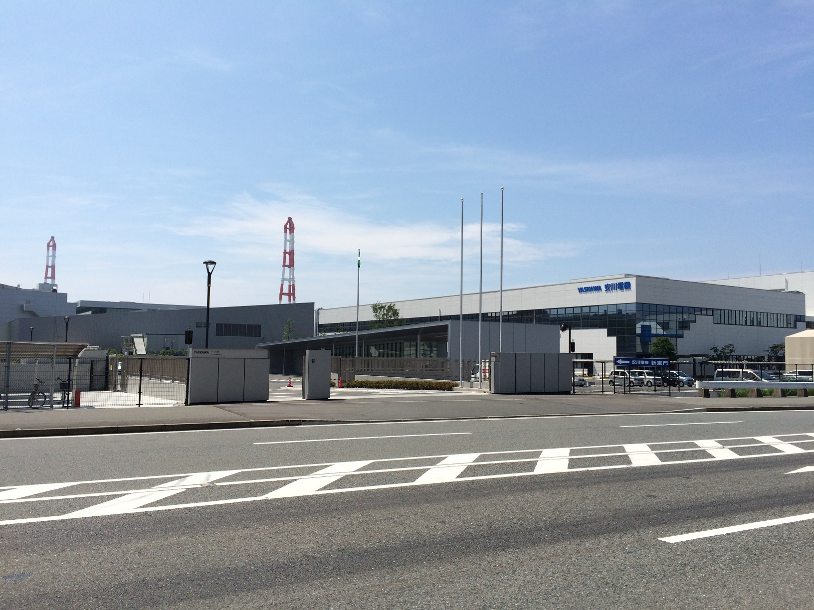 安川電機本社/八幡西事業所